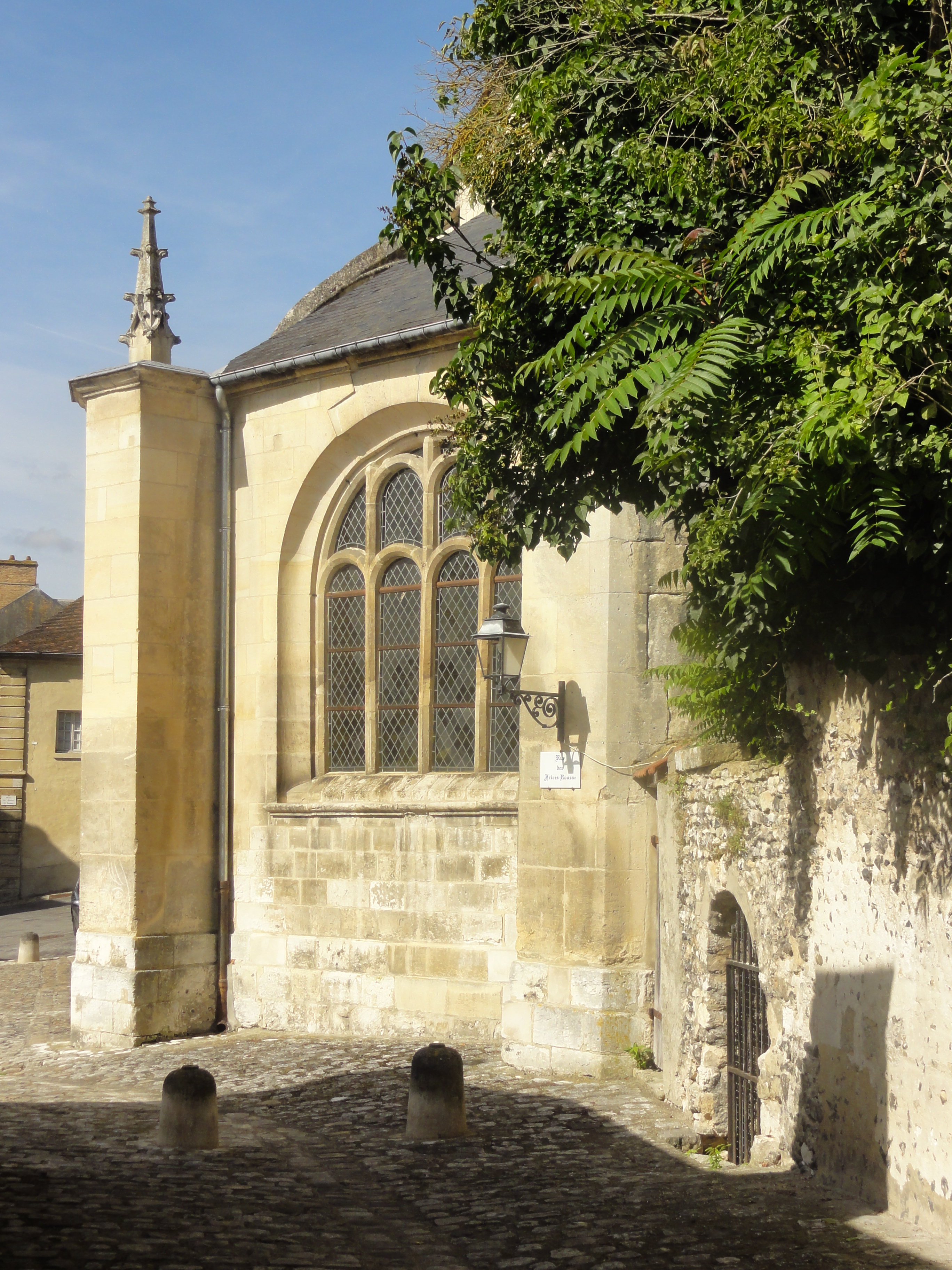 Chevet du collatéral sud.